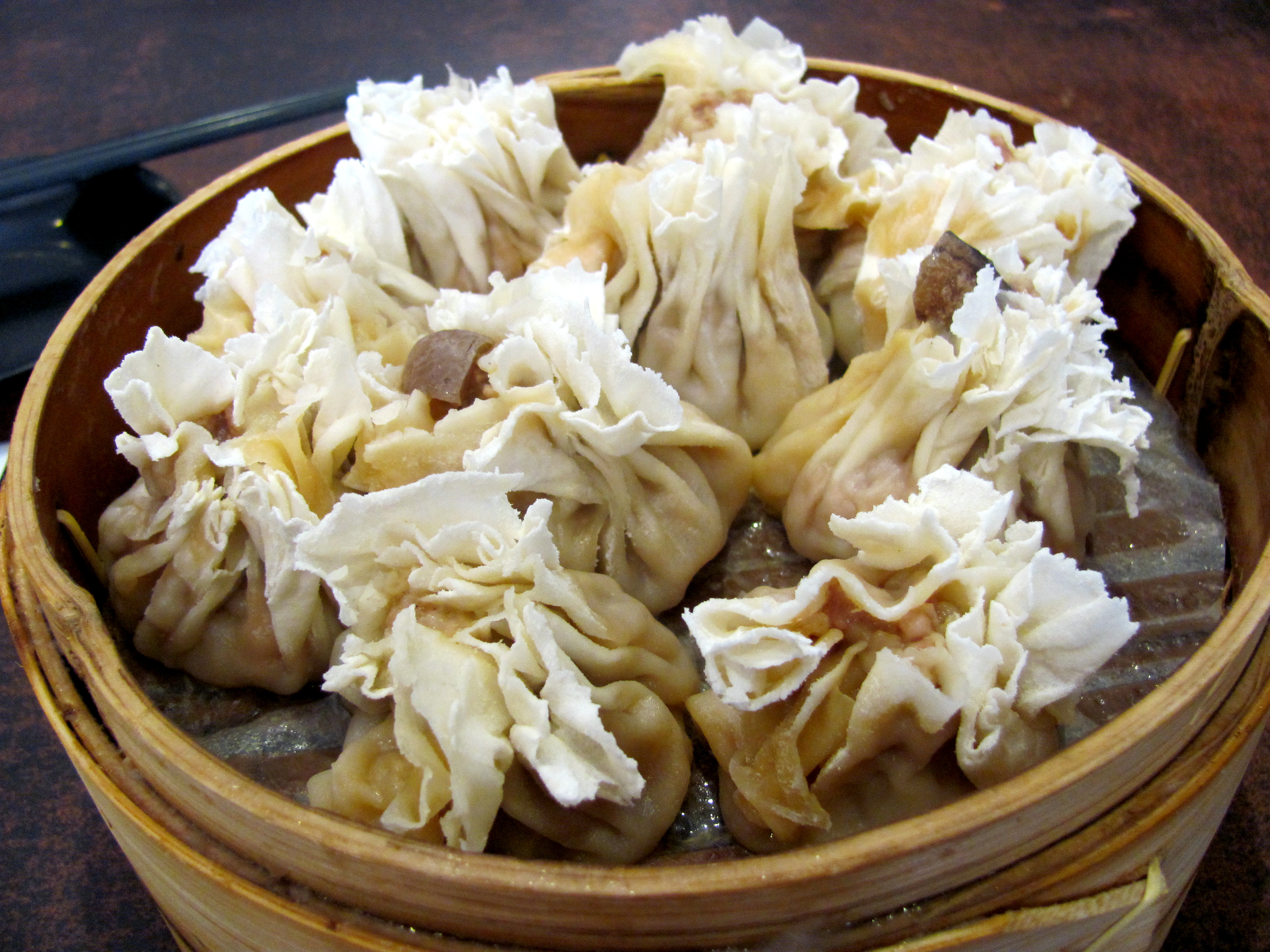 都一处烧麦